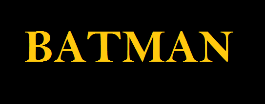 Logo de batman de 1989 adaptacion diriguida por Tim Burton